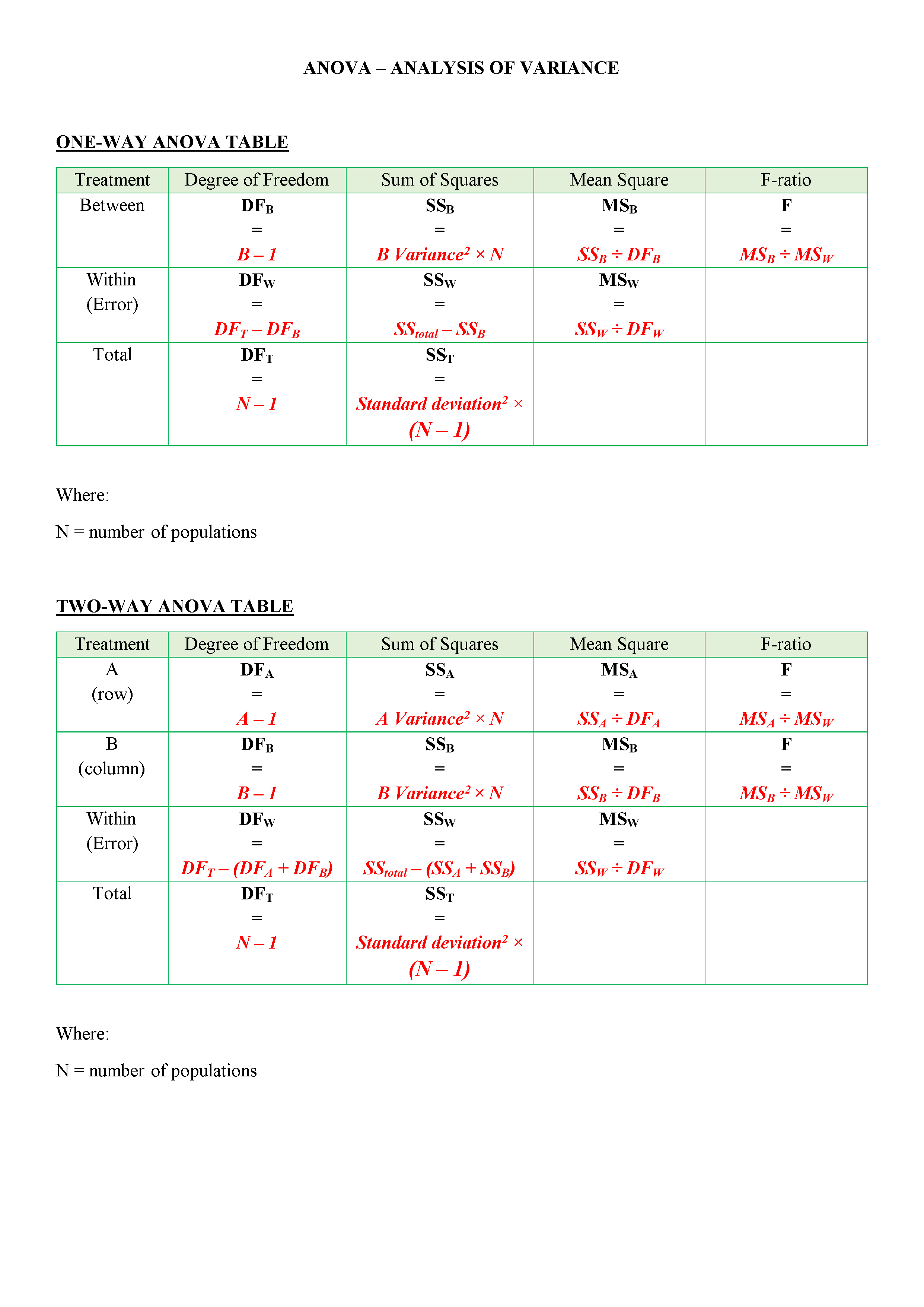 မြန်မာဘာသာ: ပိုမိုလွယ်ကူသော ANOVA တွက်ချက်နည်းဇယား